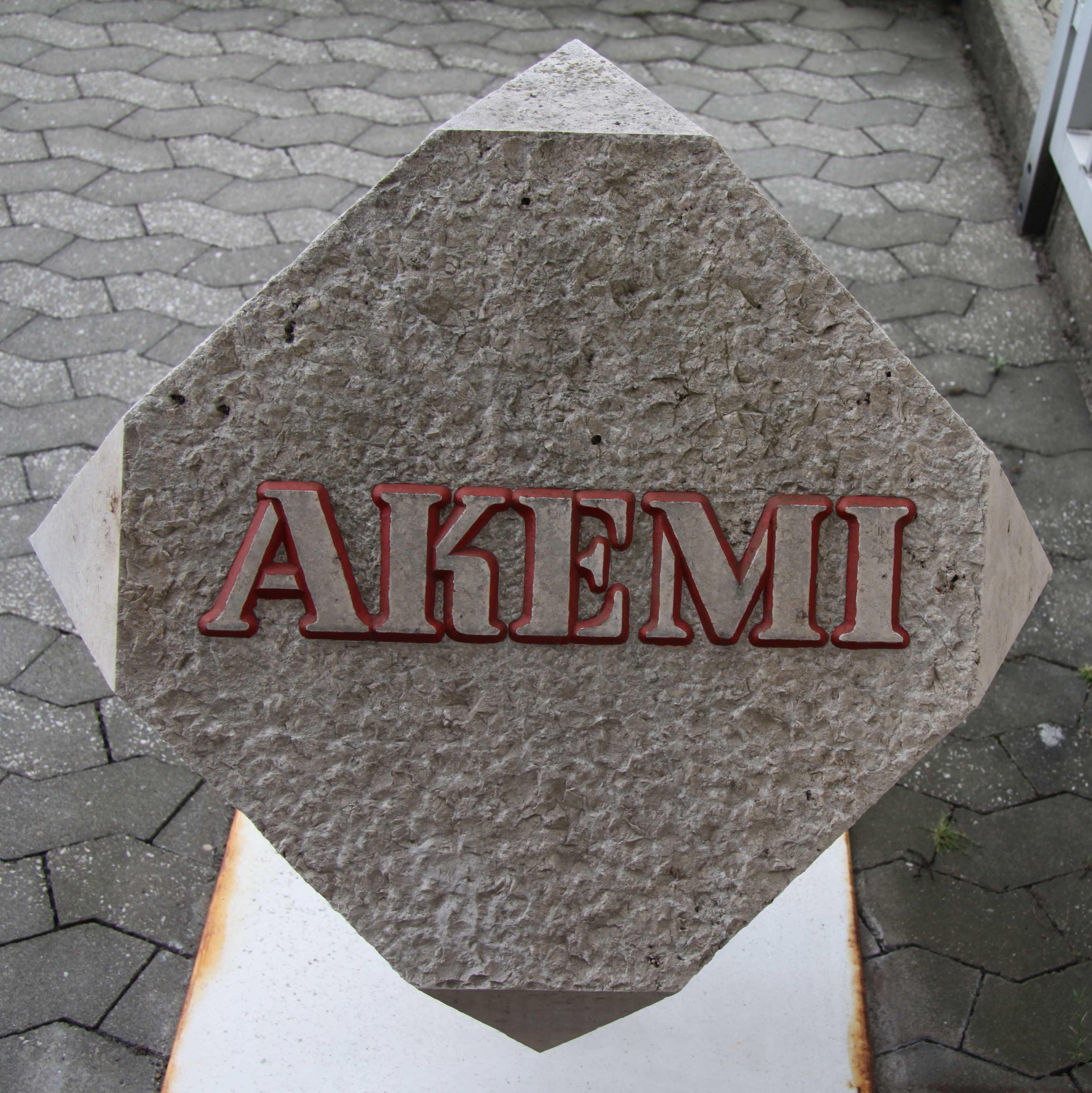 Logo von Akemi auf einem Muschelkalk